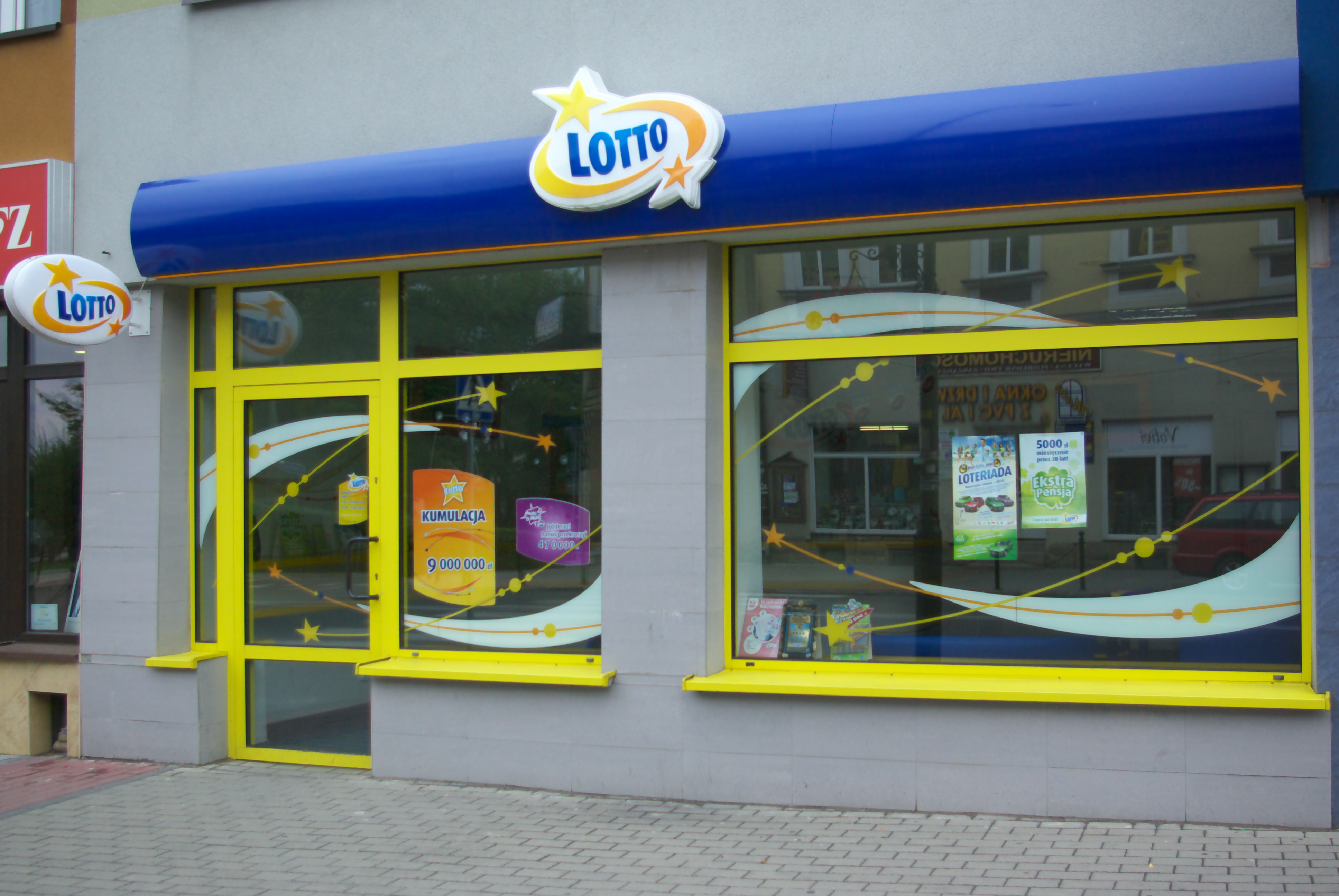 Budynek przy ulicy Tadeusza Kościuszki 12 w Sanoku